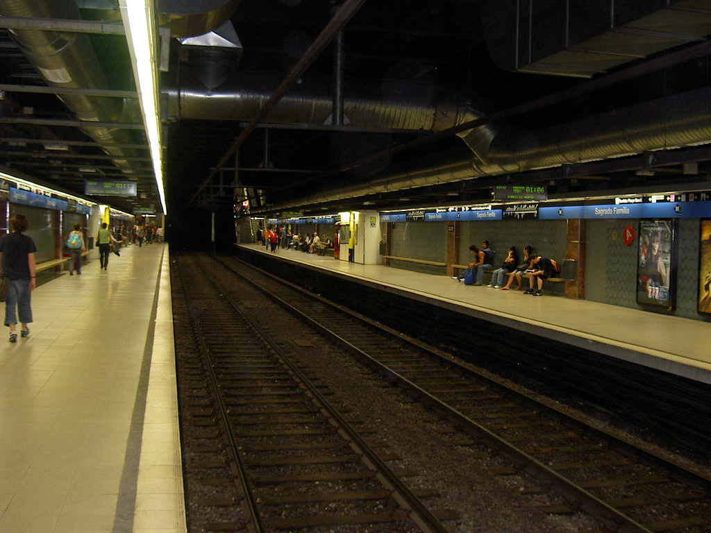 estación de metro de barcelona